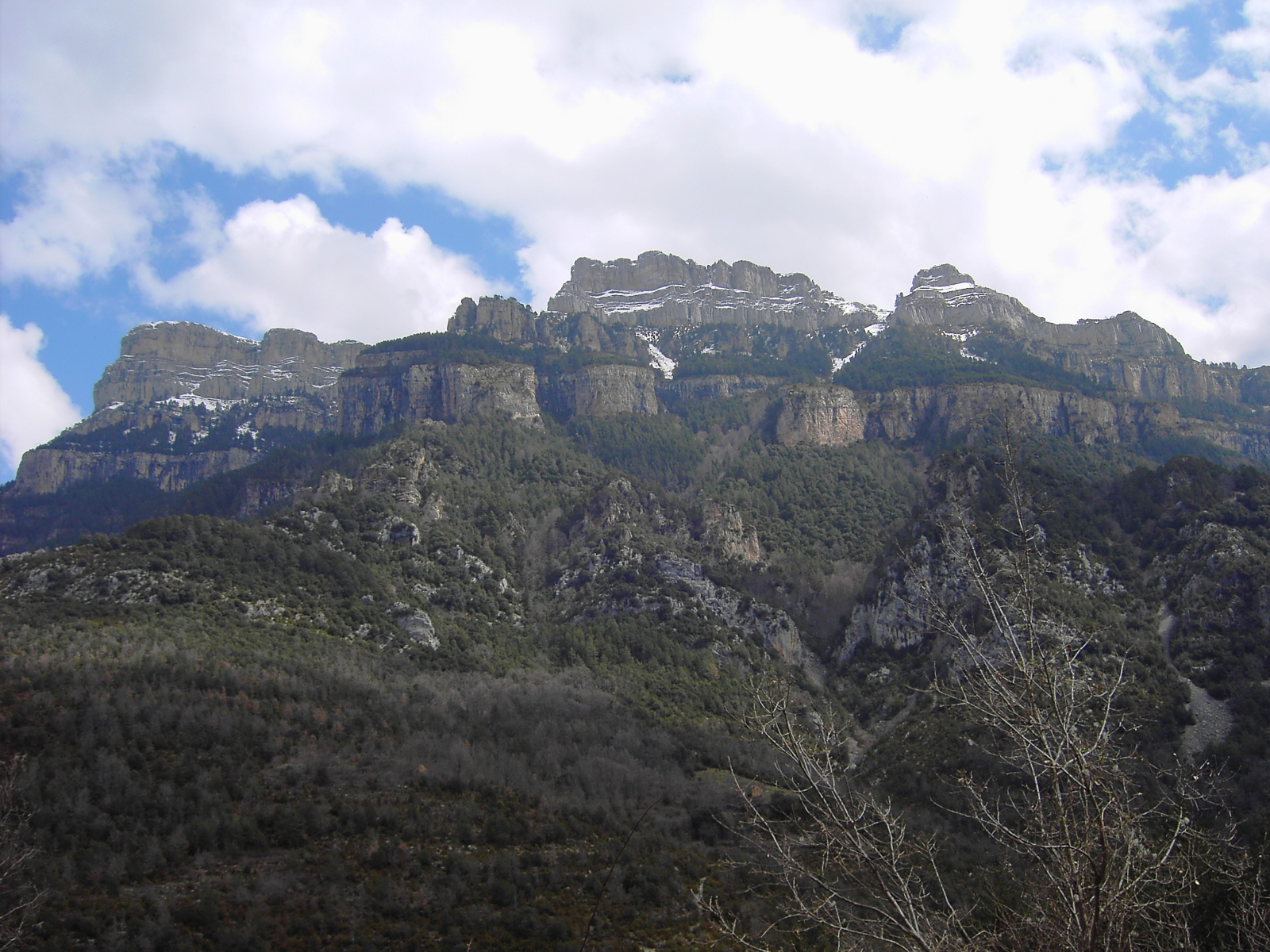 Las Sestrals, en la boca del Cañón de Añisclo, forman parte del Parque Nacional de Ordesa y Monte Perdido.